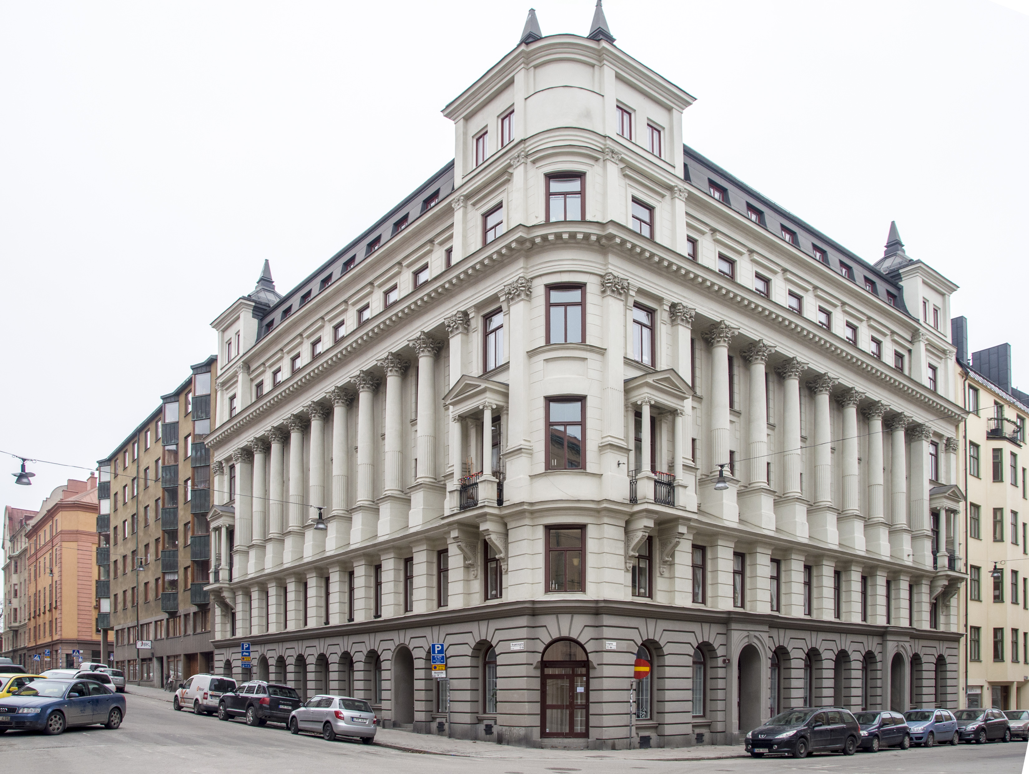 Pahl 10, Borgmästargatan 10, Åsögatan 172, Stockholm, Nybyggnadsår 1884 - 1885 Adolf Emil Melander (Arkitekt) A. W. Stening (Byggherre) A. W. Stening (Byggmästare)